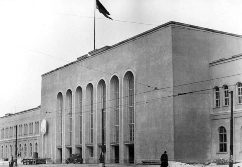 Illus-Quaschinsky Kno-Leu. 1.12.50 Berlins Ost- und Nordbahnhof. Am 1.12.50 wurden der Schlesische Bahnhof in Ostbahnhof und der Stettiner Bahnhof in Nordbahnhof umbenannt. UBz: Der Ostbahnhof.